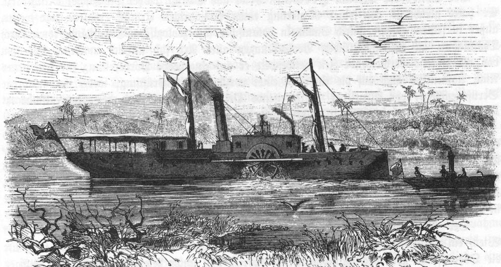 Flußdampfer Welf und Beiboot für die Juba-Flußerkundung von Carl Claus von der Decken